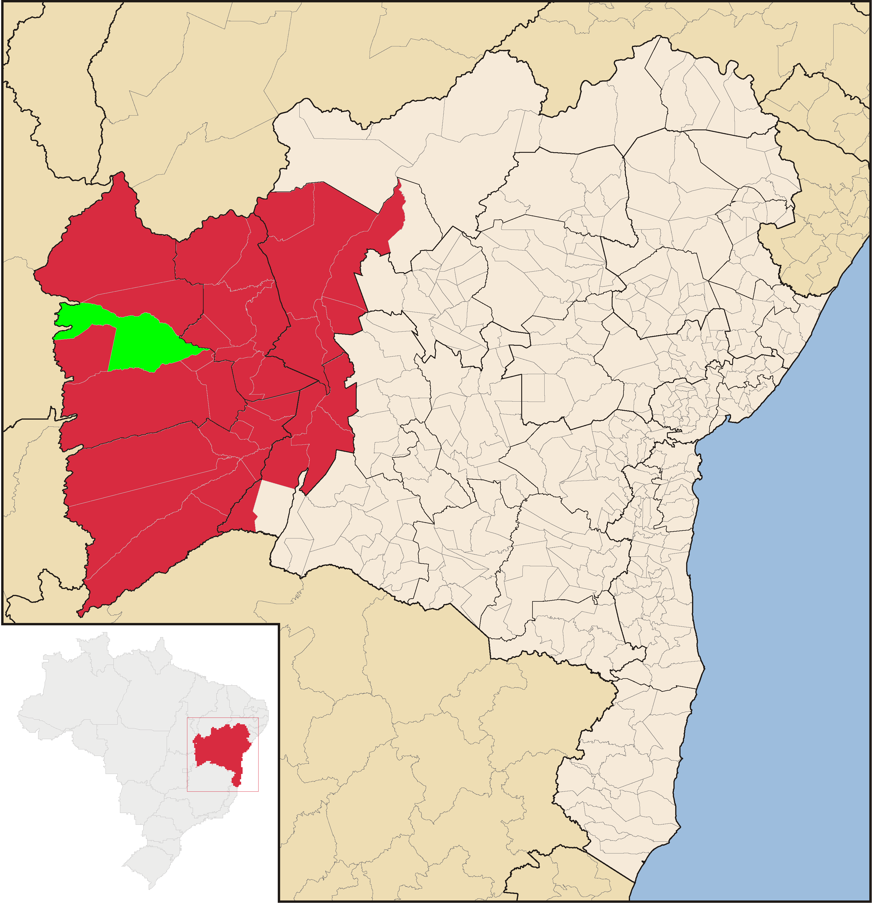 Região de cobertura da TV Oeste Município de concessão (Barreiras) Outros municípios cobertos pela TV Oeste